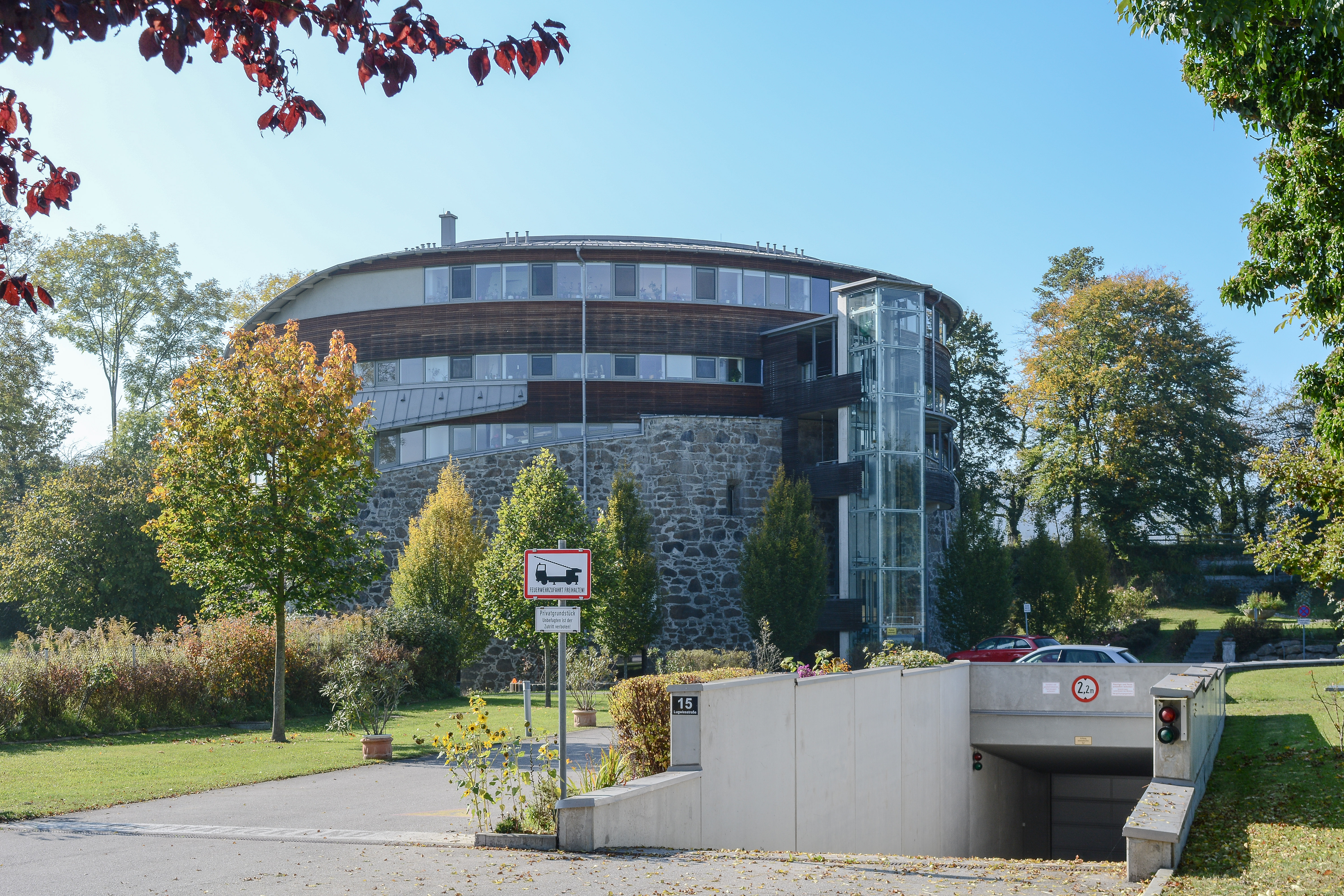 Der ehemalige Befestigungsturm XII (Agnese) wird 2014 als Wohn- und Bürohaus genutzt.